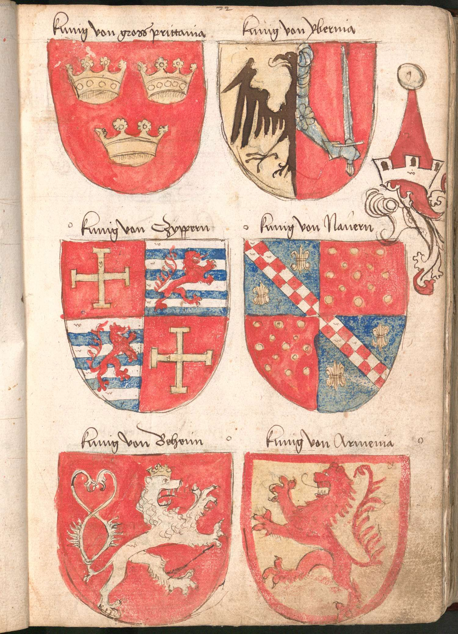 „Wernigeroder (Schaffhausensches) Wappenbuch“; Süddeutschland 4. Viertel 15. Jh. Bayerische Staatsbibliothek München, Cod.icon. 308 n Wappen König von Gross Britannien, König von Hibernia (Irland), König von Zypern, König von Böhmen, König von Armenien